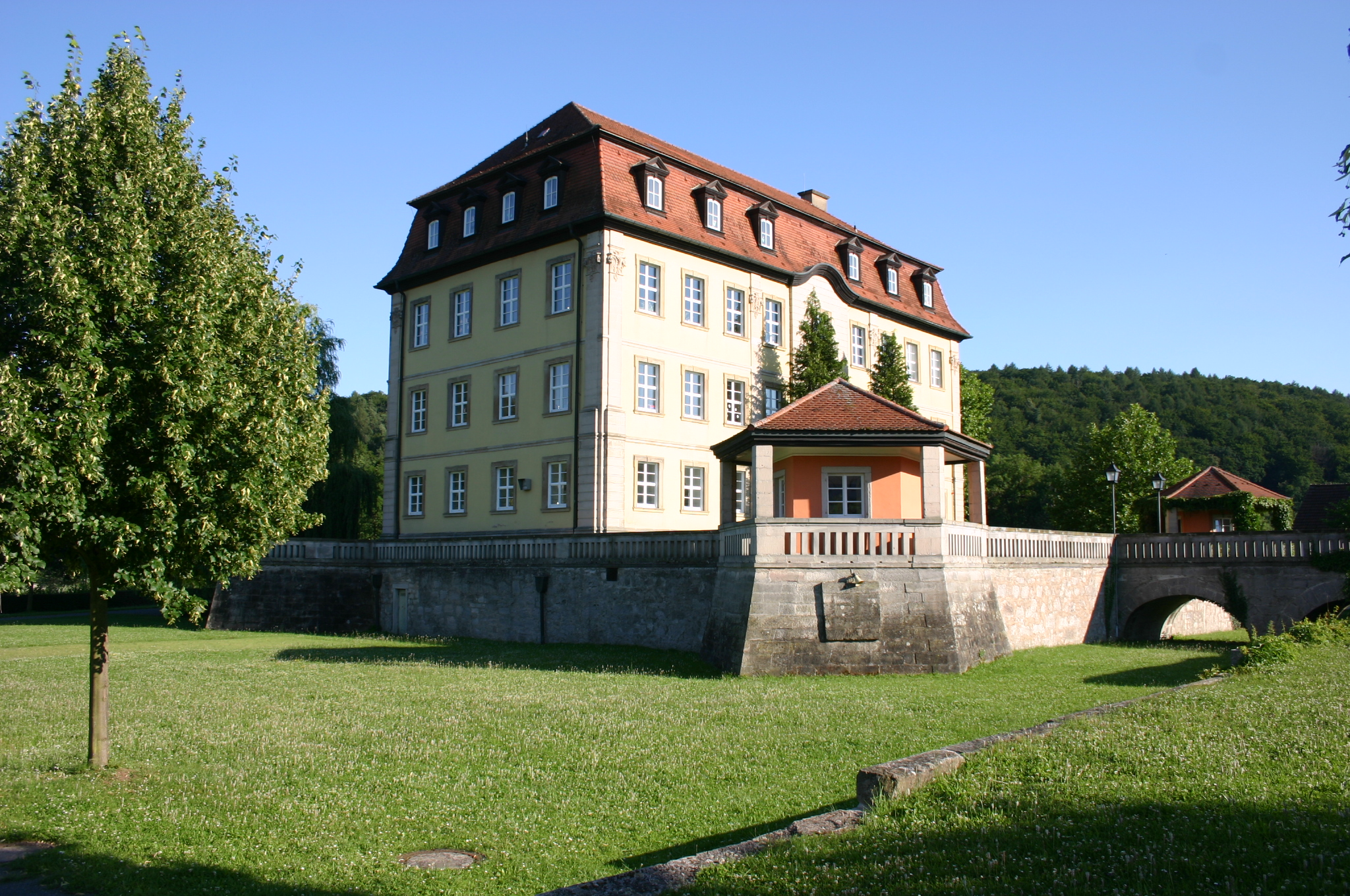 Schloß Gleisenau mit Wassergraben